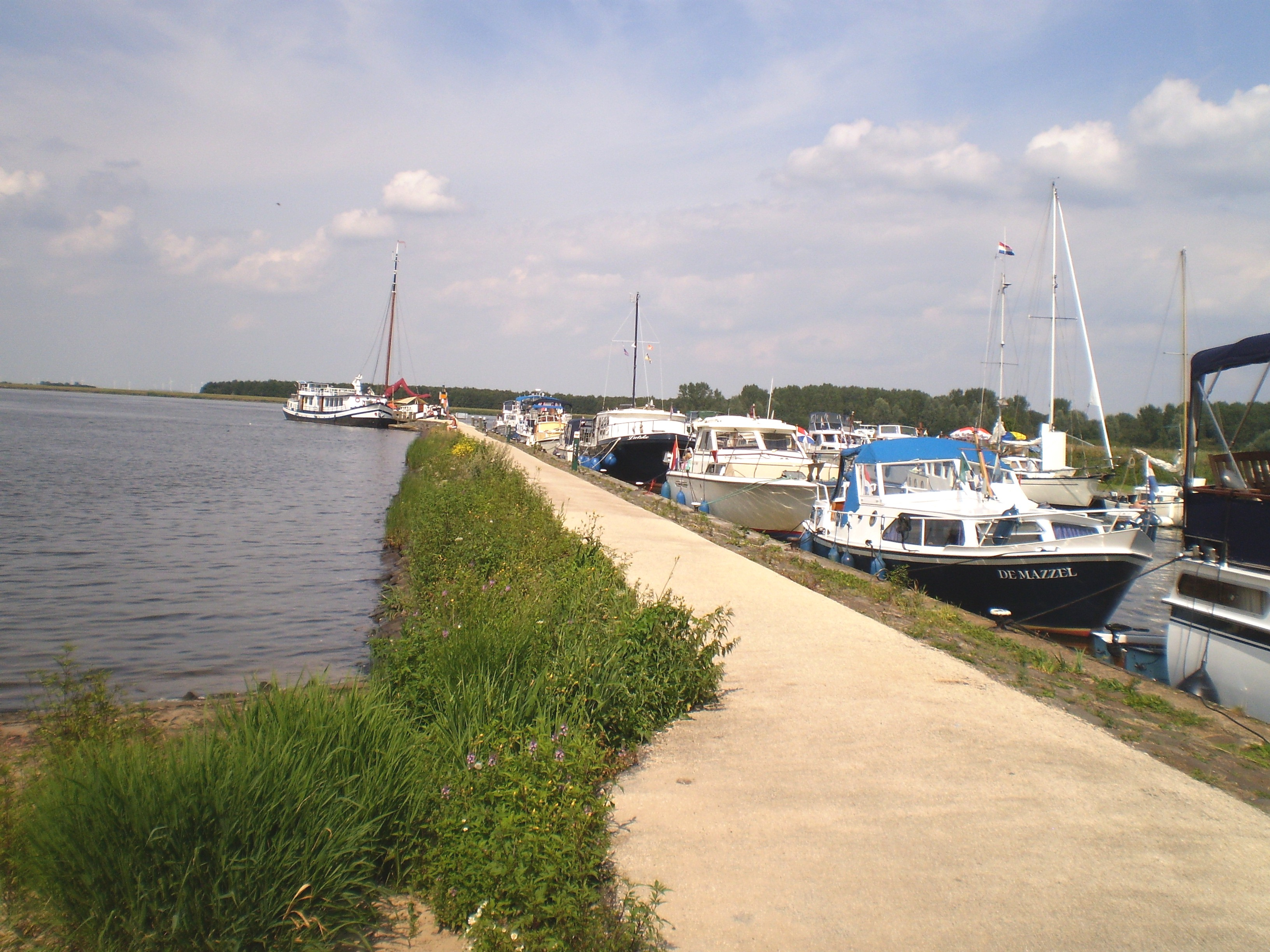 Ofbyld oanbean troch Swarte Kees op 20 augustus 2009